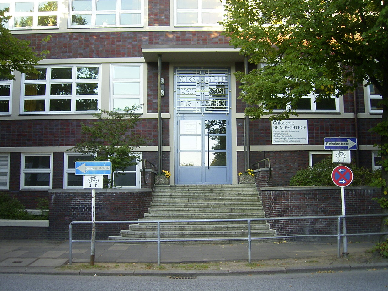 Grund-, Haupt- und Realschule Beim Pachthof in Horn, ehemaliger Mädchen-Eingang, jetzt Haupteingang)